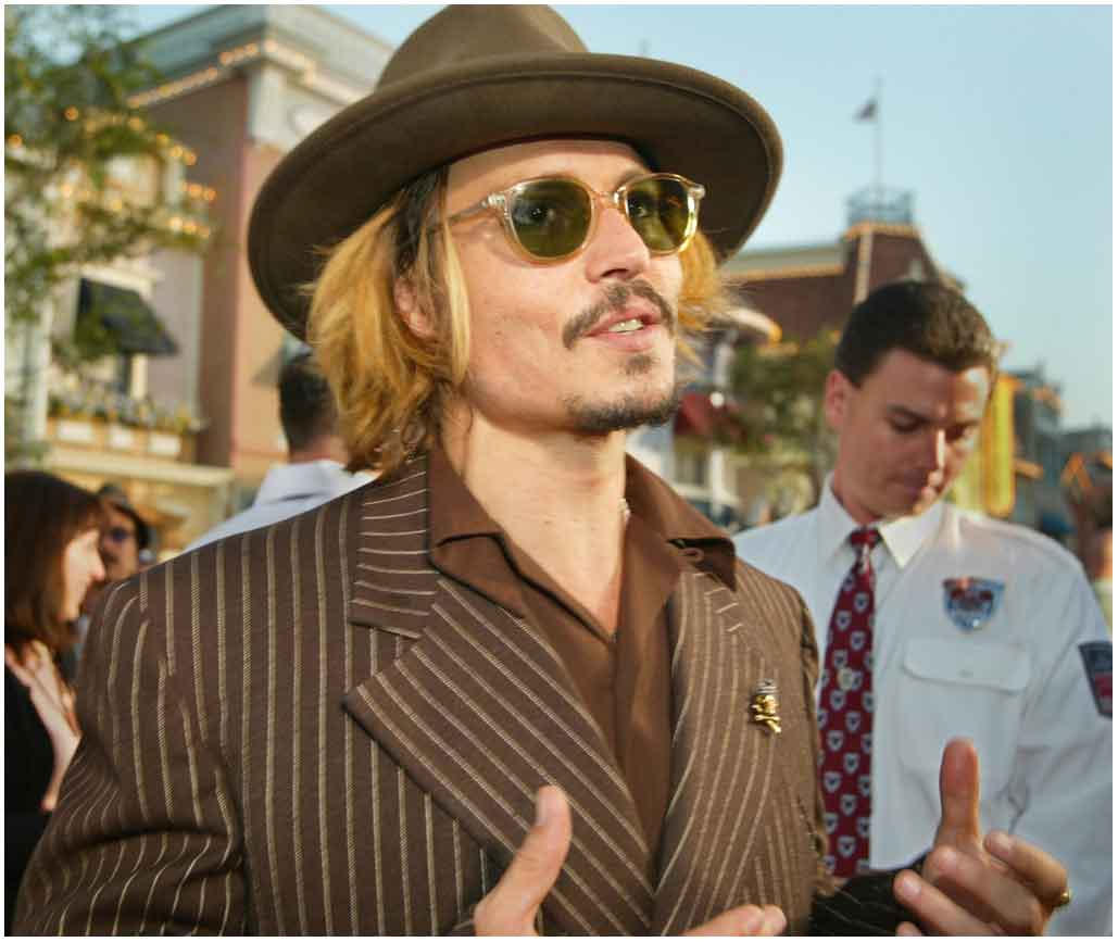 Джонни Депп, 2009 год.